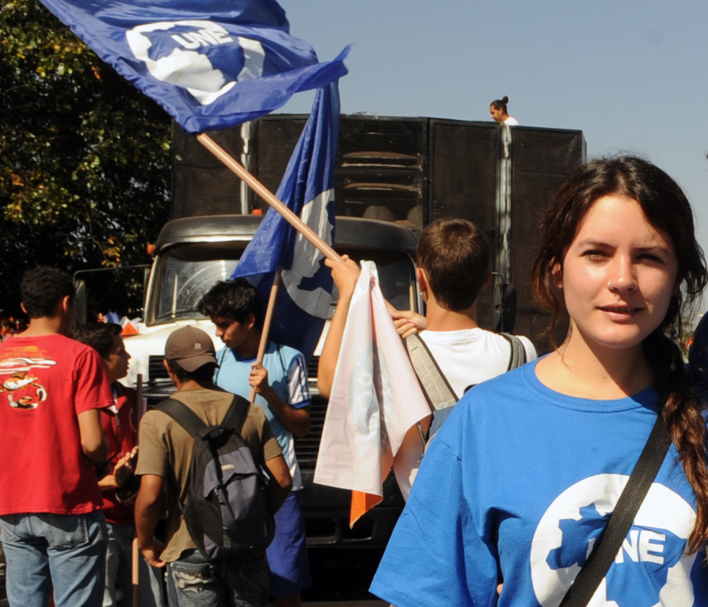 ma das principais líderes do movimento estudantil chileno,Camila Vallejo, participa da Marcha dos Estudantes, organizada pela União Nacional dos Estudantes (UNE), em Brasília